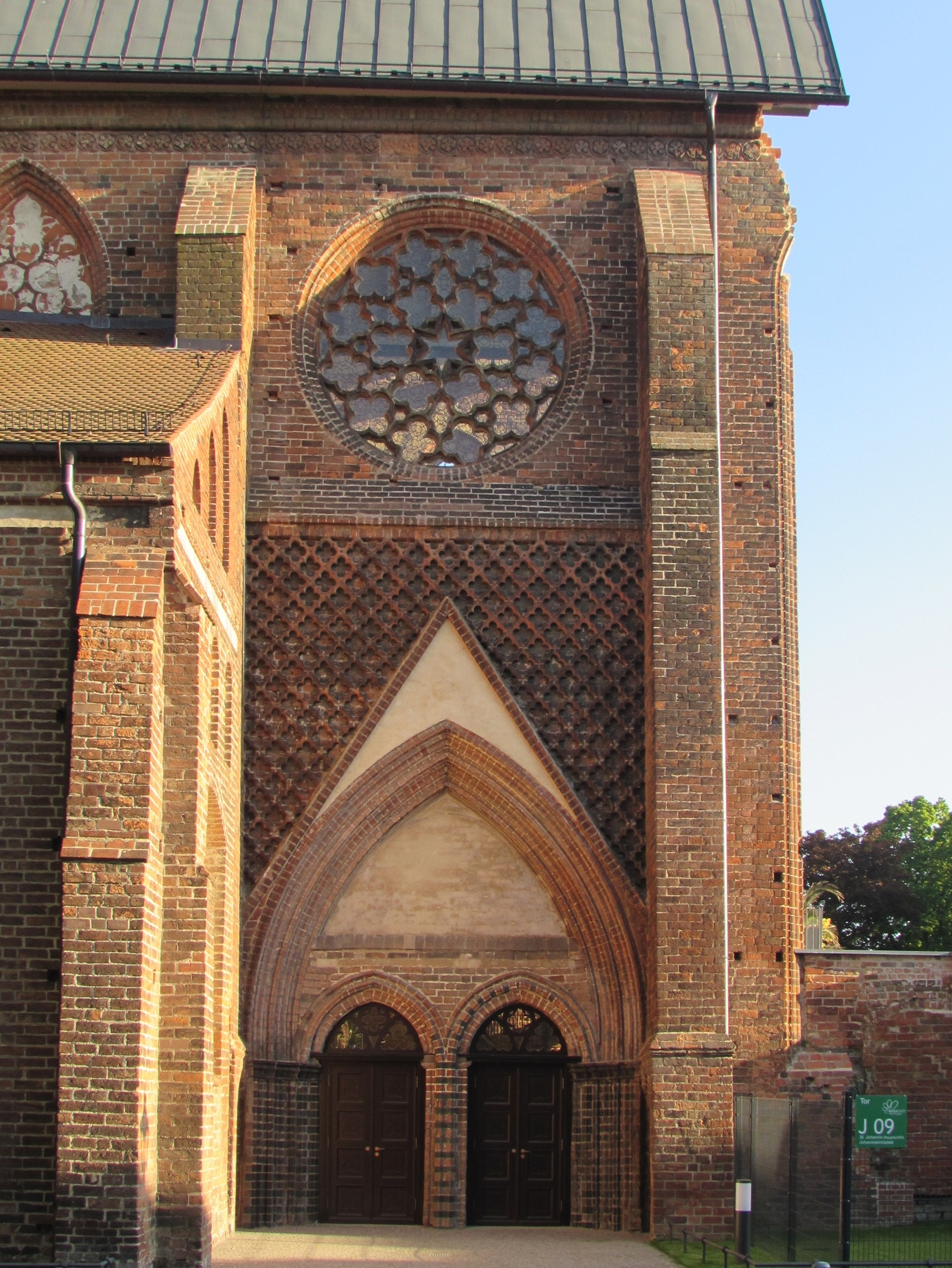 st. johannis, brandenburg an der havel, nordwestportal und rosette